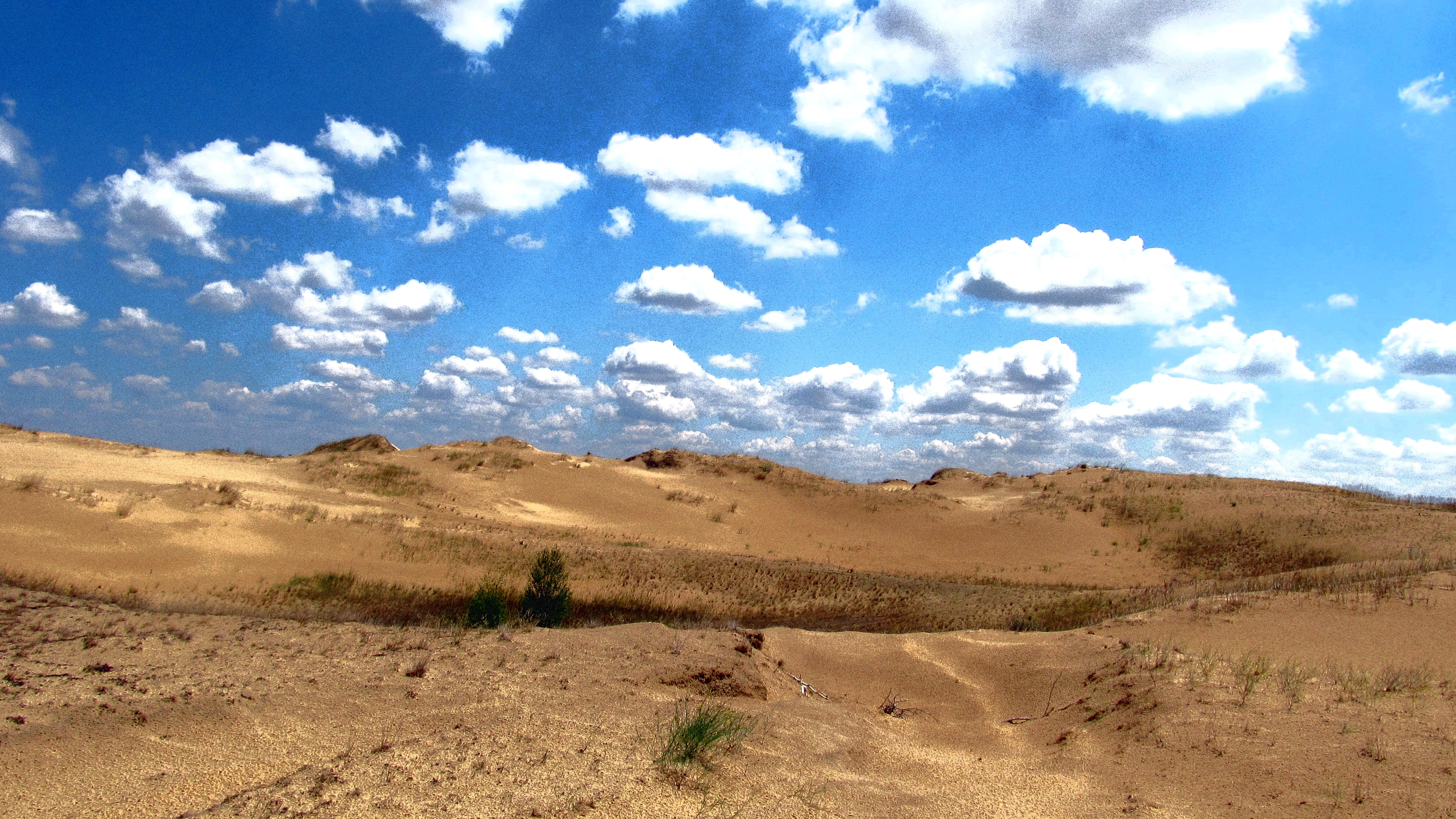 Олешківські піски